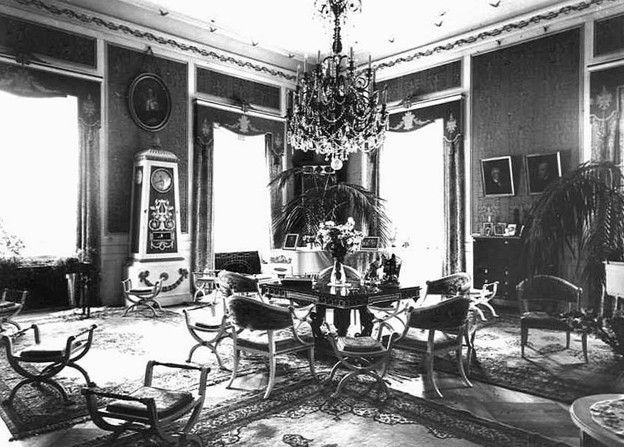 Årsta slott, Salongen, "Fredrika Bremers" våning